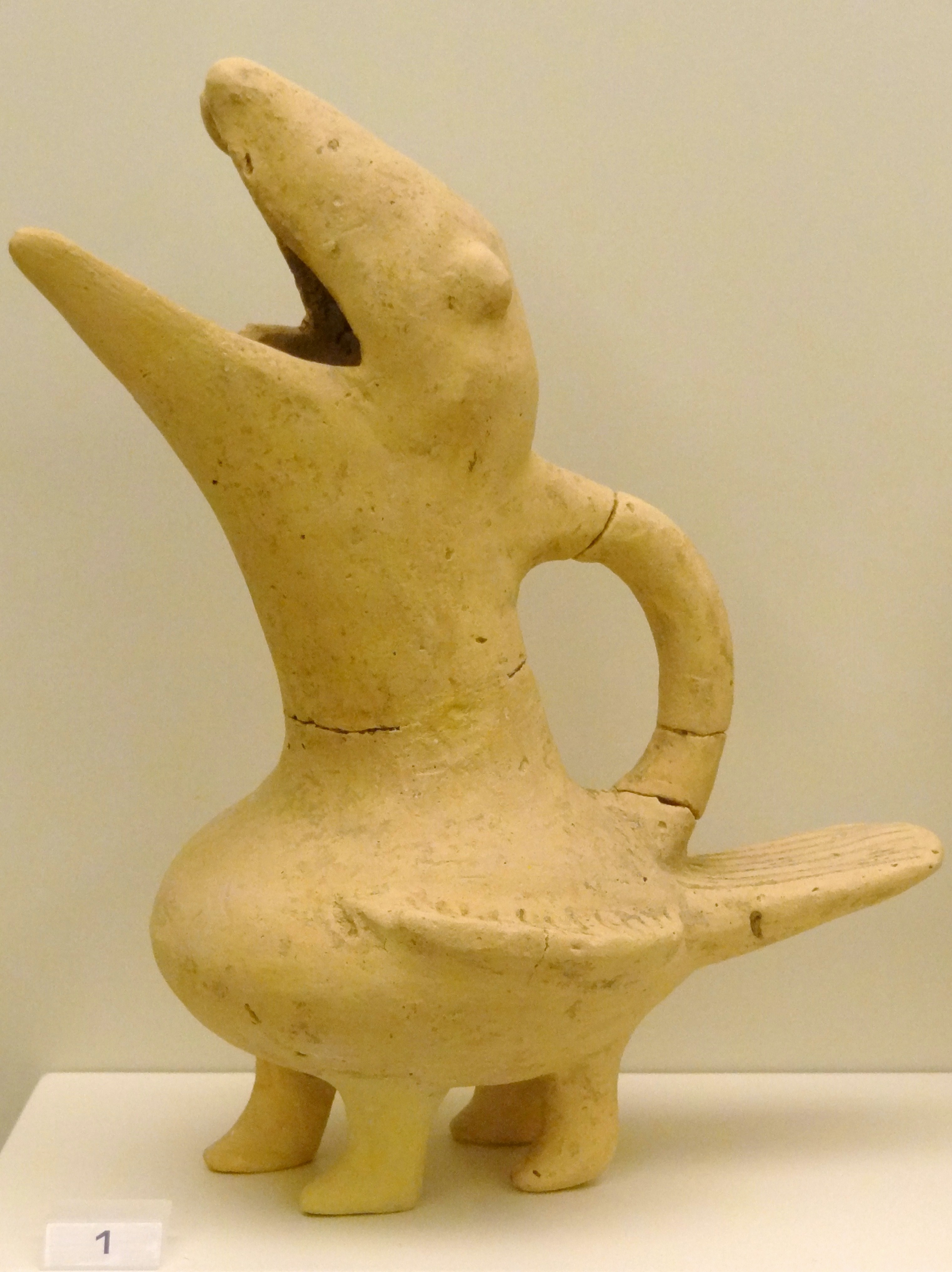 Vogelförmige Tonvase (Vorpalastzeit, 2600–2300 v. Chr.) aus Koumasa (Messara), ausgestellt im Archäologischen Museum Iraklio, Kreta, Griechenland